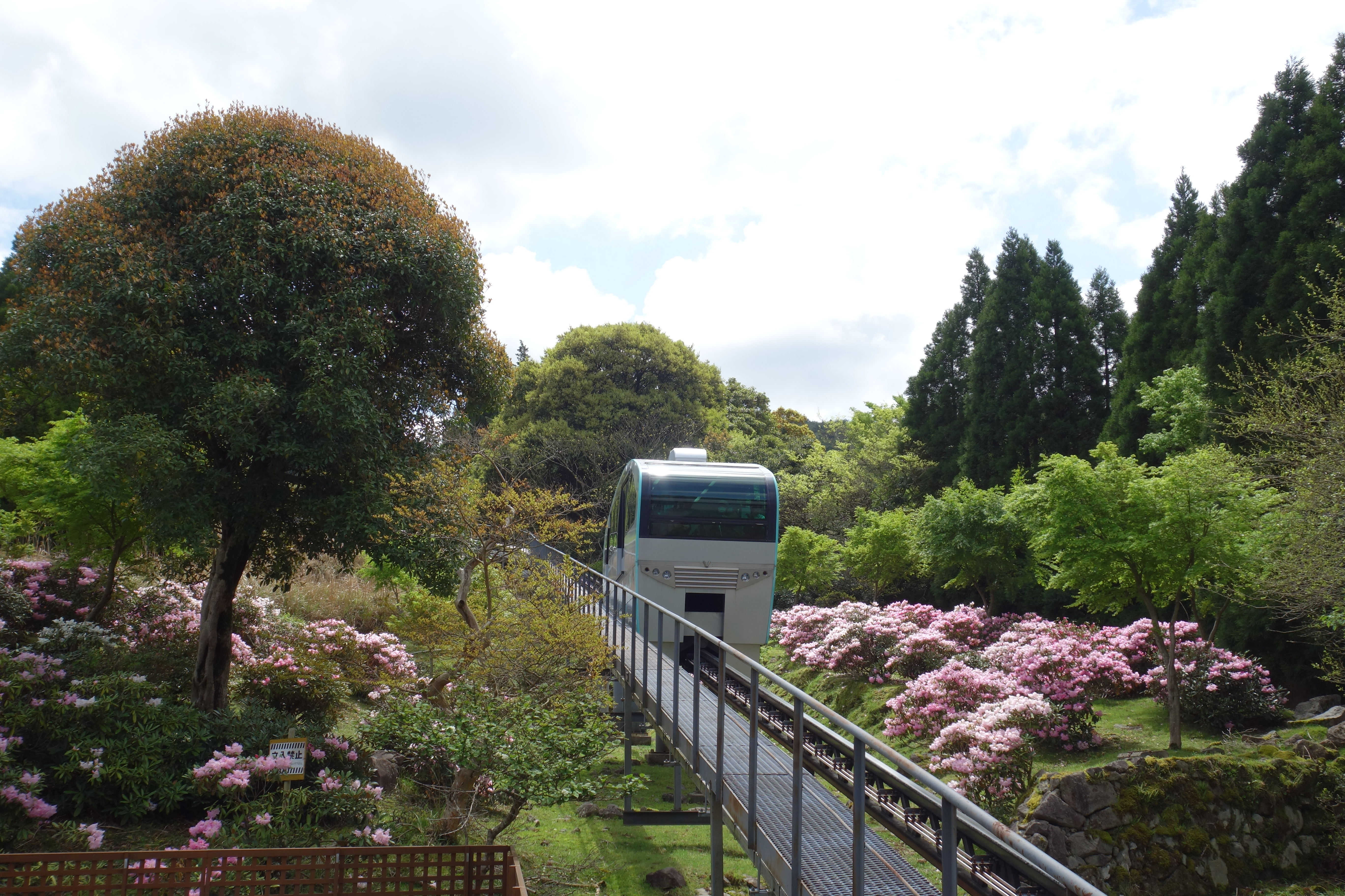 英彦山花園スロープカーとシャクナゲ